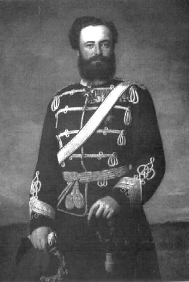 Georg